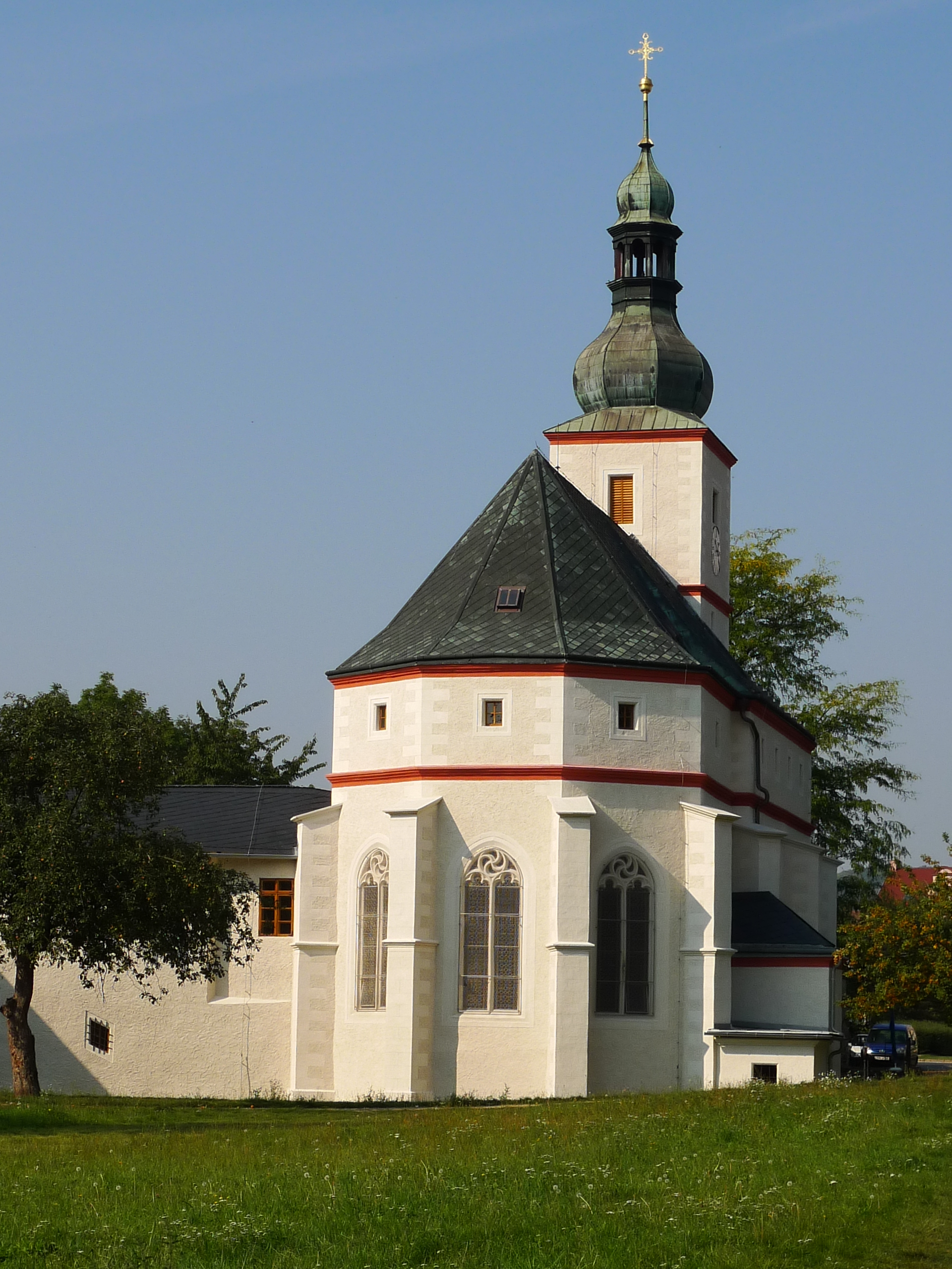 Kostel svatého Floriána, parc. 6, 23/2, Krásné Březno.